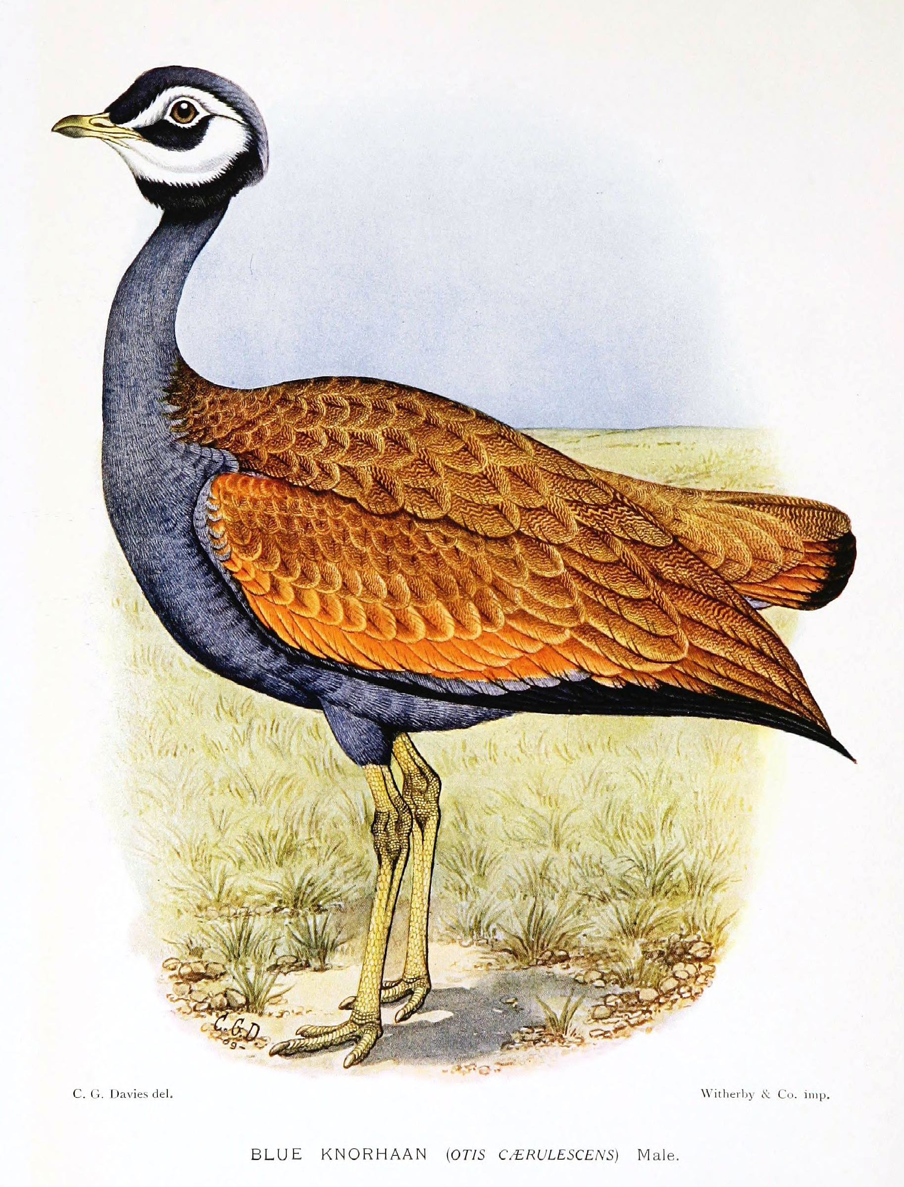 Eupodotis caerulescens